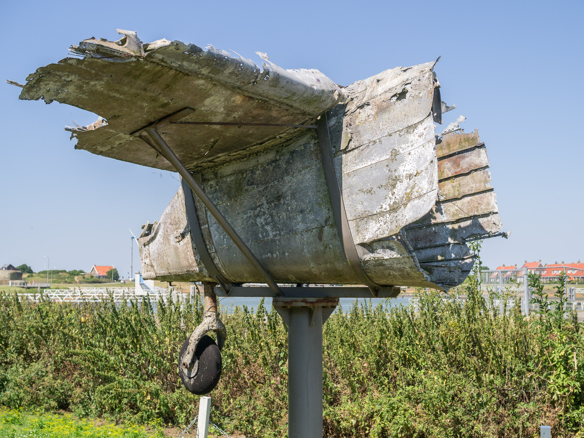 Kazemattenmuseum - Staartdeel Lockheed Hudson wrak